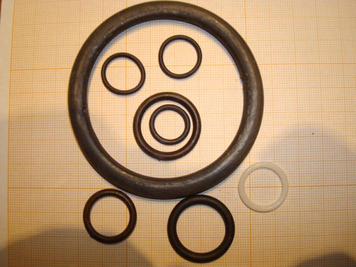 Photo des divers joints toriques, formants un visage.